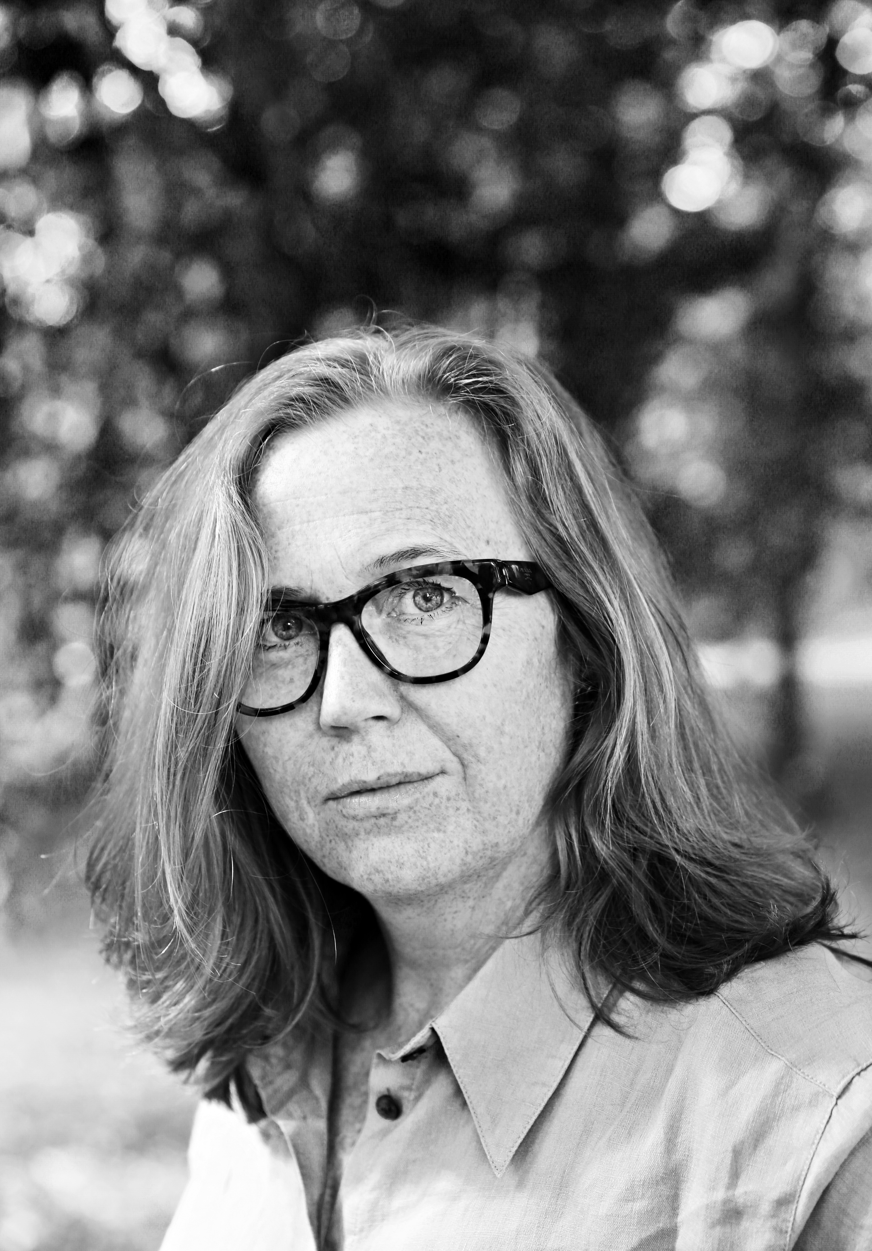 Lene Therese Teigen. Foto: Signe Dons